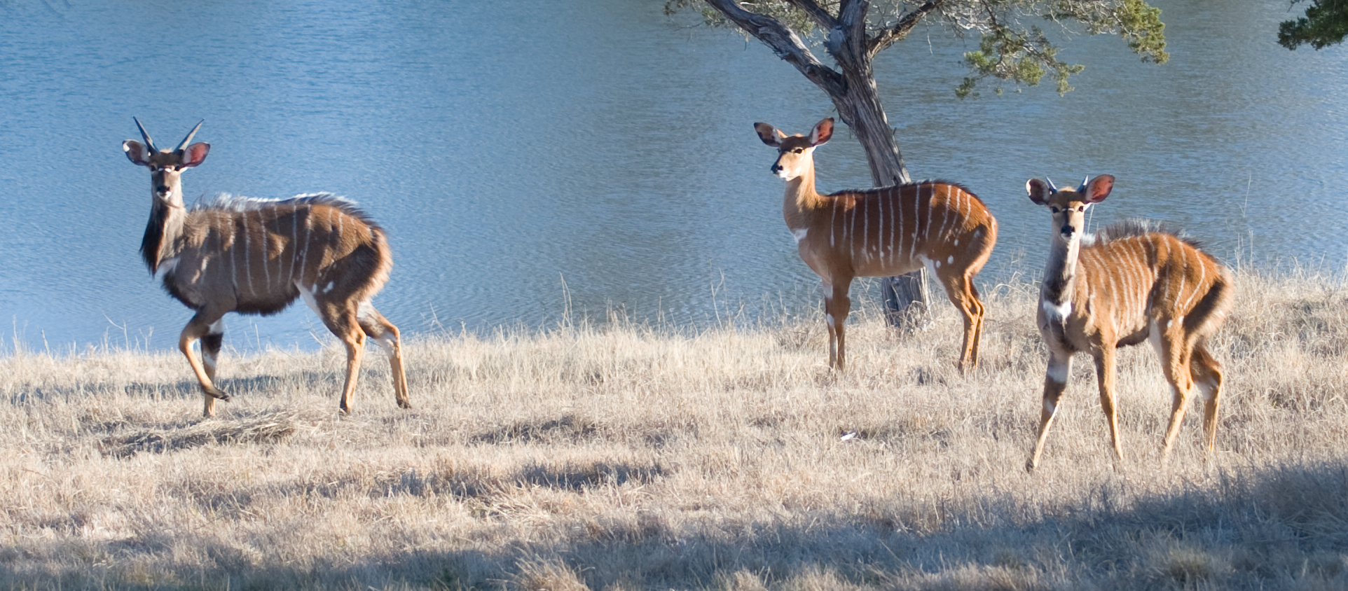 0A6O2790